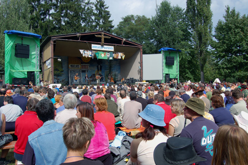 Mohelnický dostavník (country and folk festival)